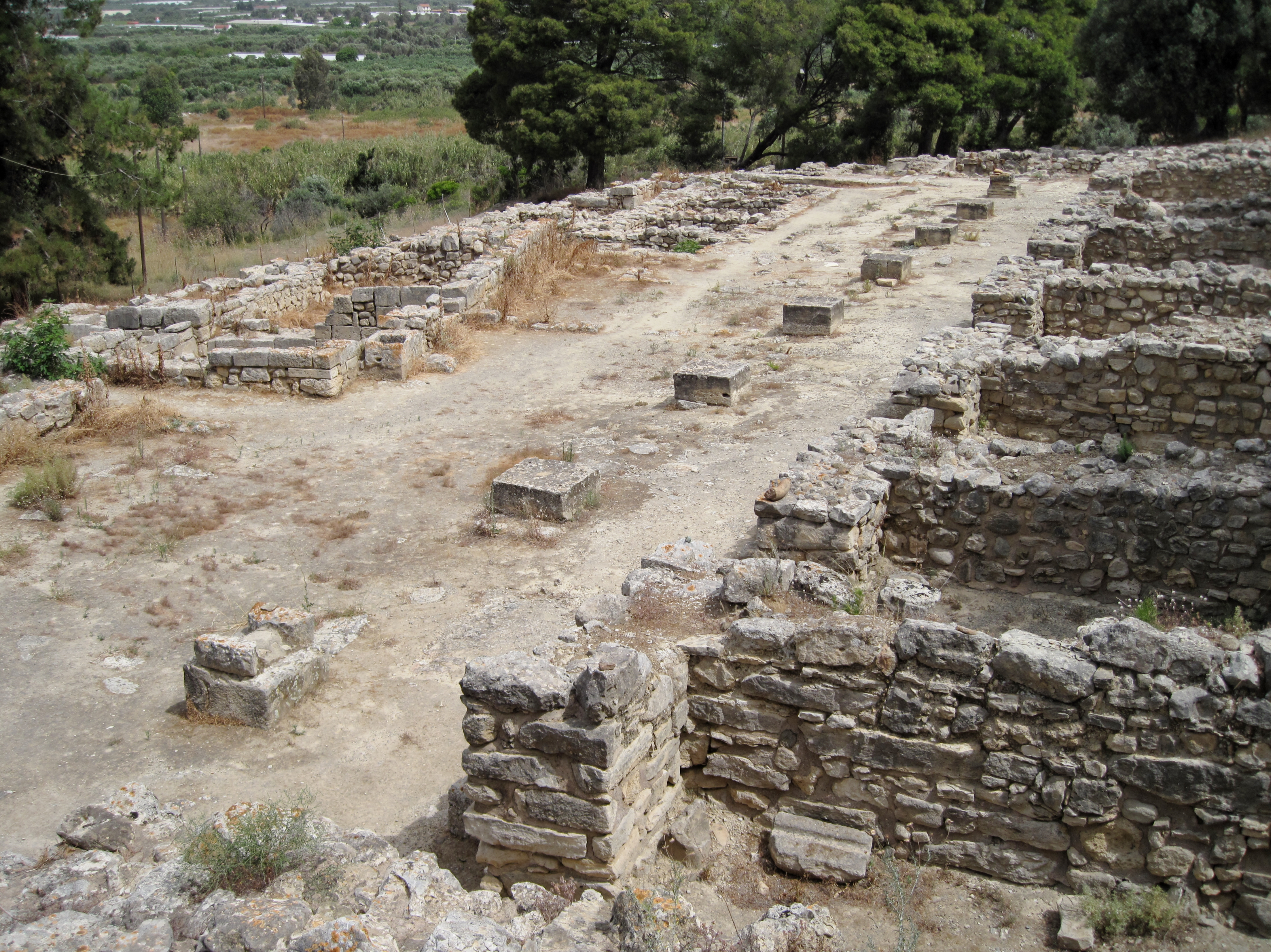 Ausgrabungsstätte von Agia Triada in der Gemeinde Festos, Regionalbezirk Iraklio, Kreta, Griechenland